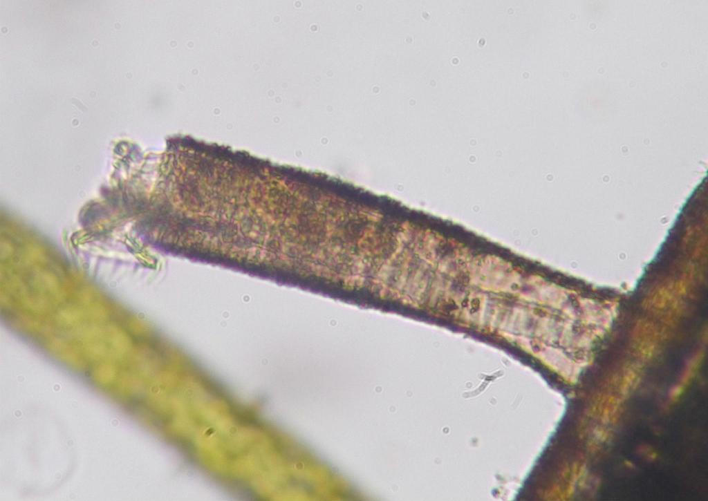 Limnias sp.：ワツミワムシ属の１種 2016/07/31 和歌山県田辺市：Tanabe City. Wakayama Pref. Japan